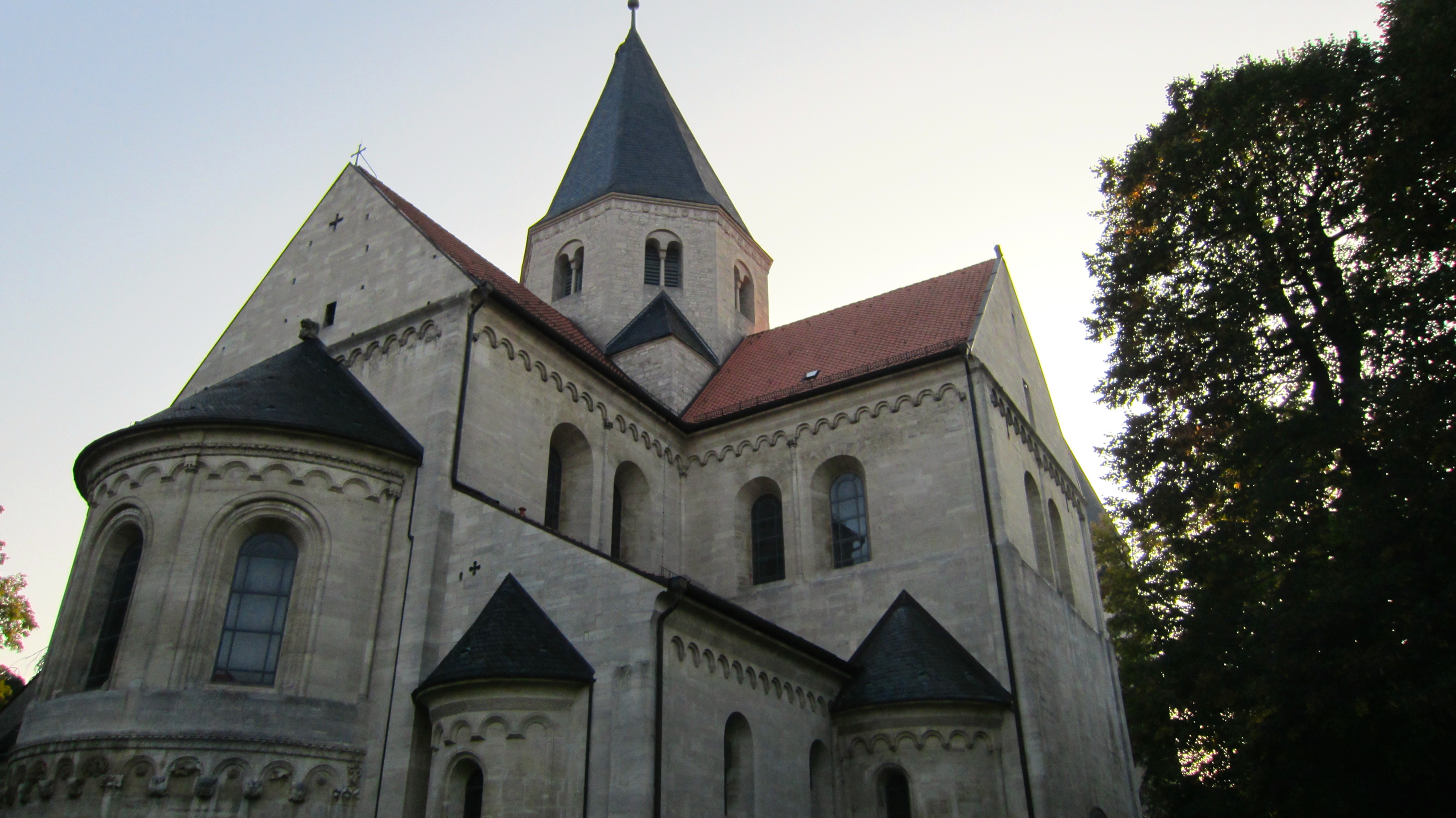 Kaiserdom, Königslutter am Elm, Vor dem Kaiserdom 38154 Königslutter am Elm, Standort: 52° 14′ 40,99″ N, 10° 48′ 56,59″ E